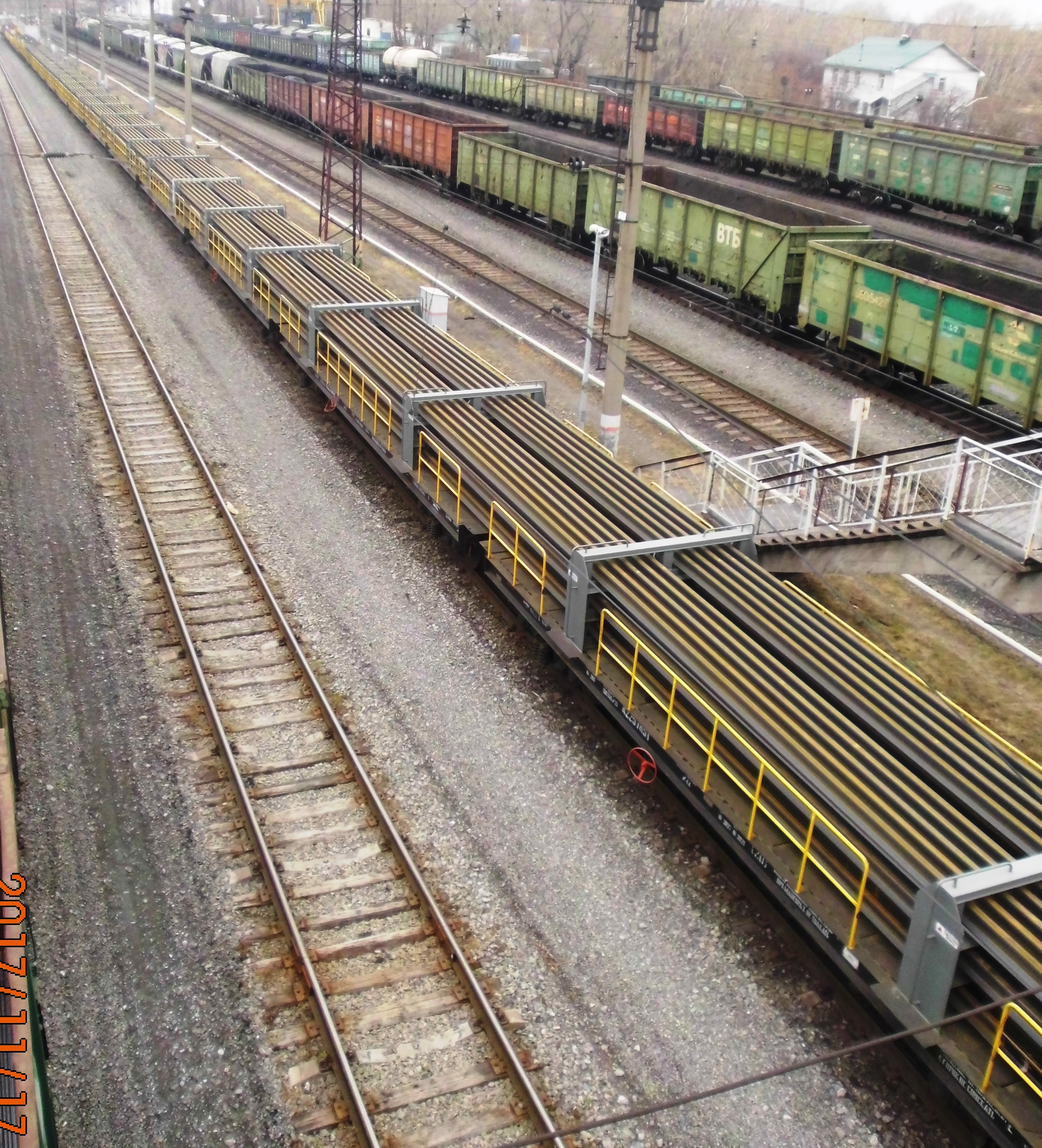 Рельсовозный состав РС-800/3 на железнодорожной станции Металлургическая ЮУЖД с 30 рельсовыми плетями по 800 м длиной сваренных на РСП-13 г. Челябинск. вид с середины в хвост состава.